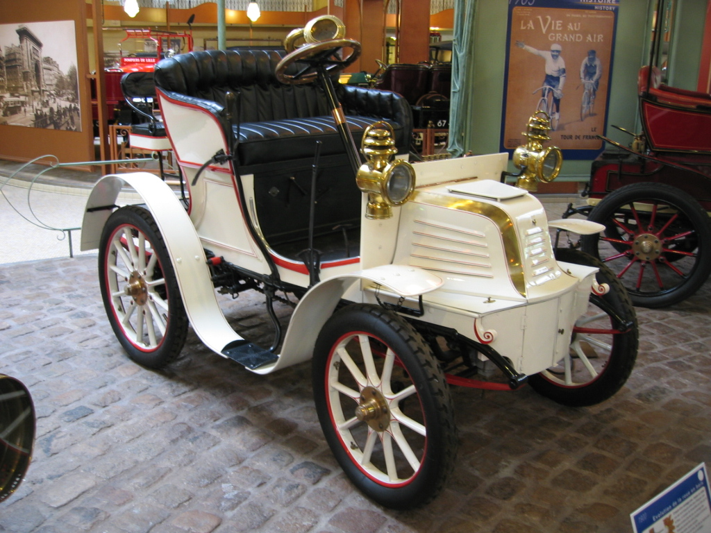 Peugeot Type 36 Spider de 1901 - Musée Peugeot Sochaux